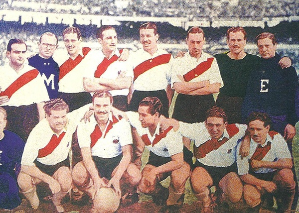 River campeón de 1942. Arriba: Yácono, Ramos, Vaghi, Ferreyra, Rodolfi y Barrios. Abajo: Deambrossi, Moreno, Pedernera, Labruna y Loustau.